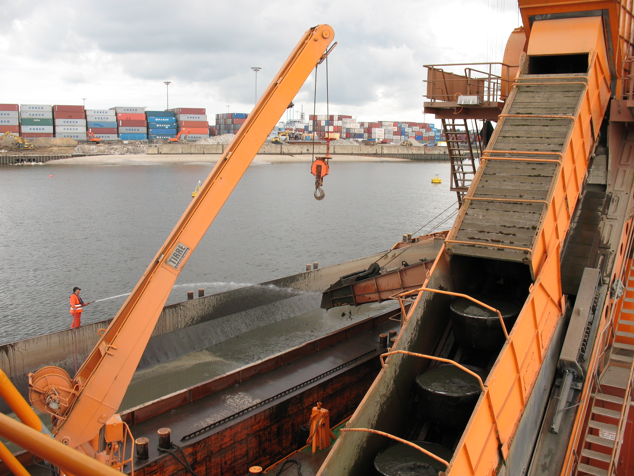 Eimerkettenbagger Heimdall der Hamburg Port Authority (Schlickbaggerung im HAmburger Hafen)